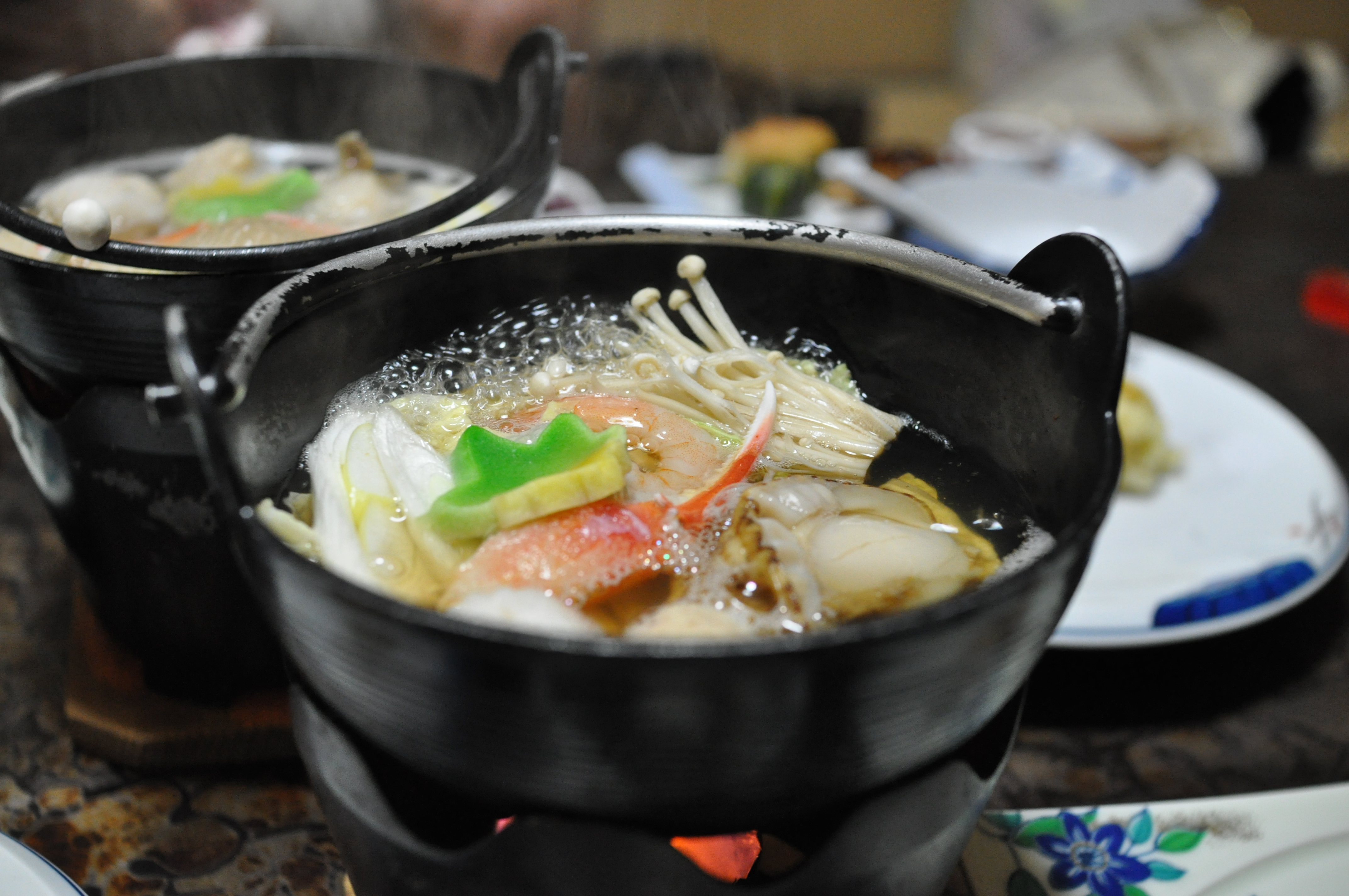 @Izumi-so